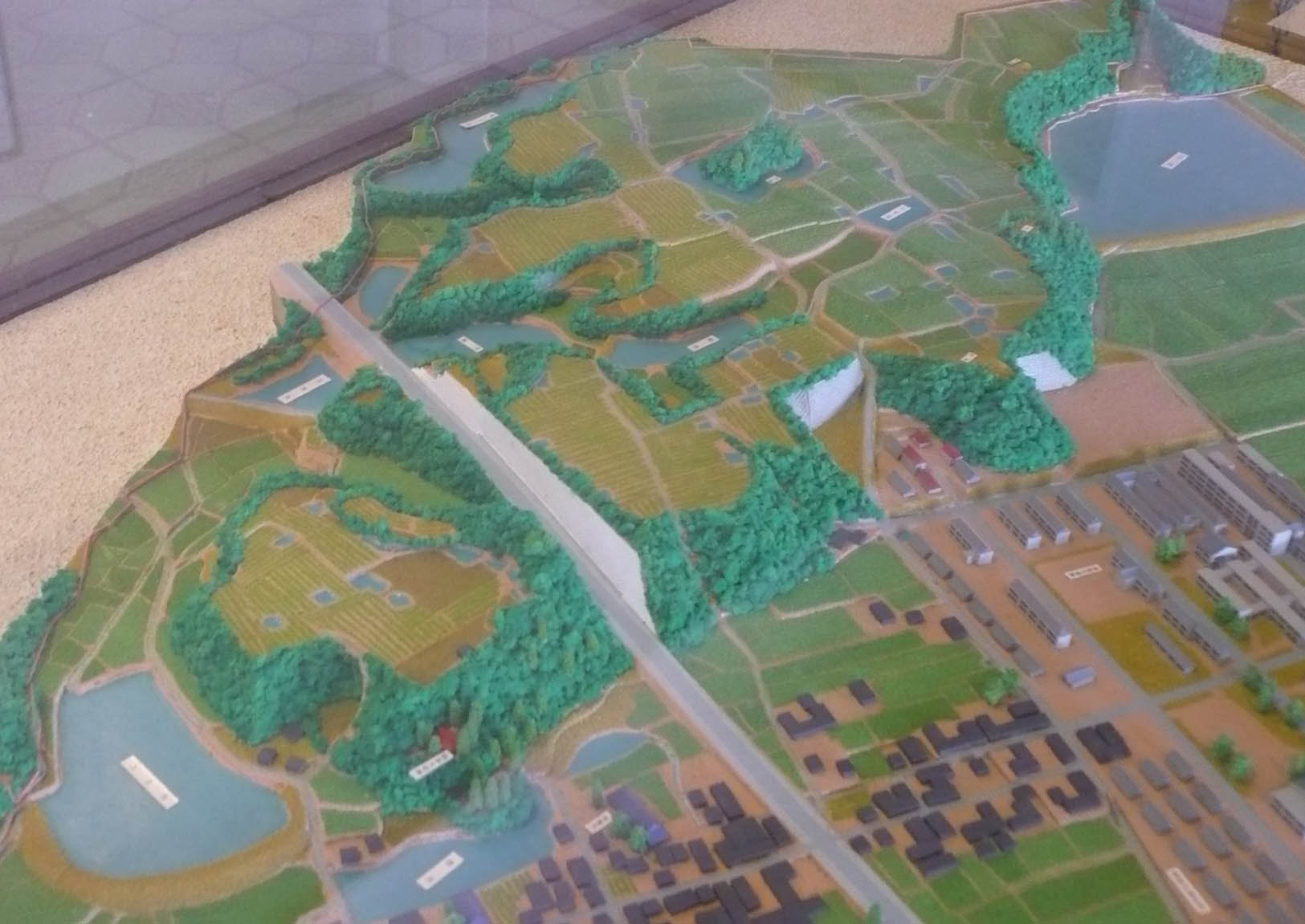 神戸市玉津土地区画整理事業区域の事業計画前の模型